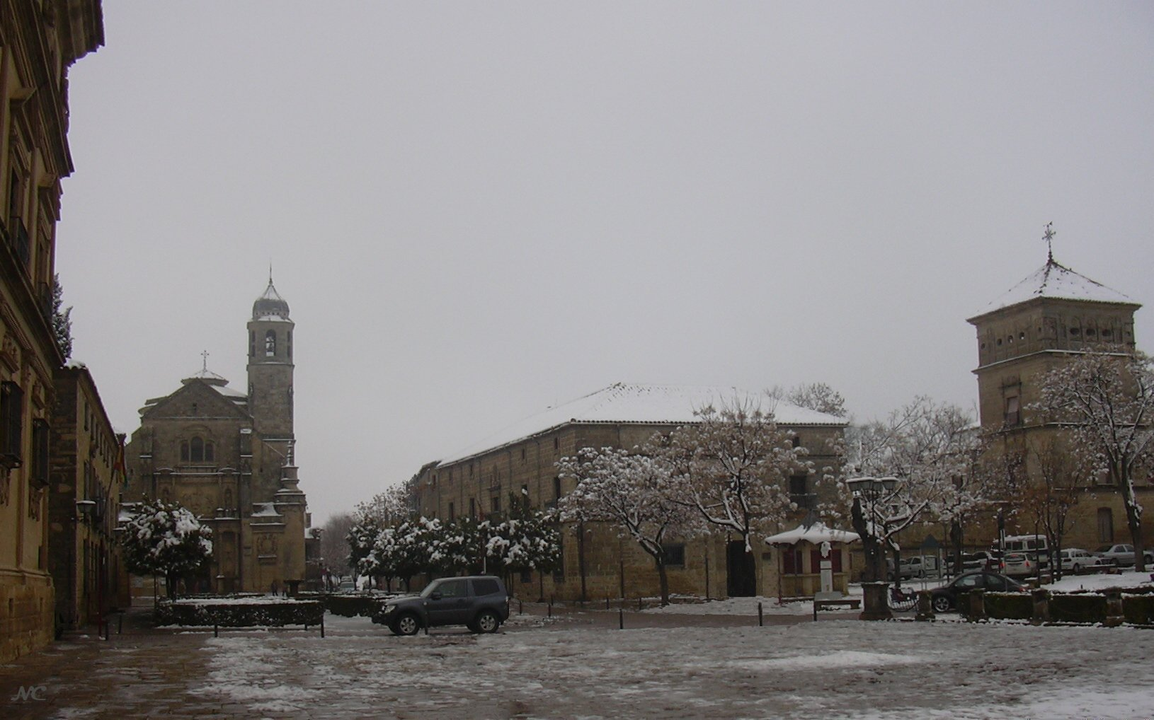 Plaza Vázquez de Molina en Úbeda (Jaén, España)